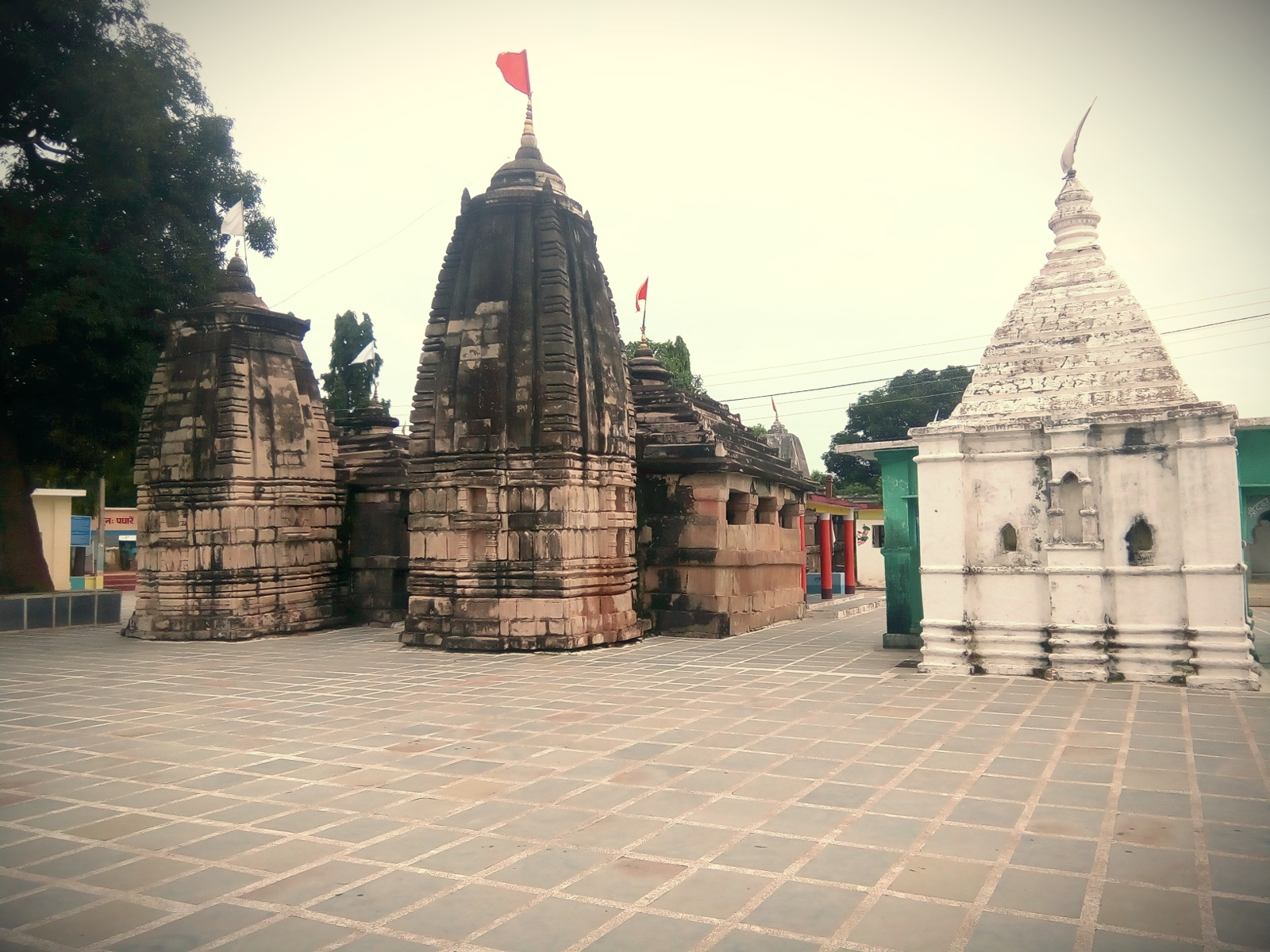 पुरातत्व वेक्ताओं के शोध और श्री कर्णेश्वर महादेव मंदिर में शिलालेख के अनुसार सोमवंशी राजाओं के पूर्वज जगन्नाथ पूरी उड़ीसा का मूल निवासी था ईस्वी सन ११३० में राज्य विस्तार में रजा सिंहराज नगरी आये उनके पुत्र बाघराज ईसवीं सन ११५० से ११७० और बाघराज के पुत्र भोपदेव ११७० से ११९० और भोपदेव के पुत्र राजा कर्णदेव हुए | मंदिर के पुजारी के कहे अनुसार यह मंदिर १२ शताब्दी में निर्मित है तथा राज्य(छत्तीसगढ़) के पुरातत्व विभाग द्वारा संरक्षित है